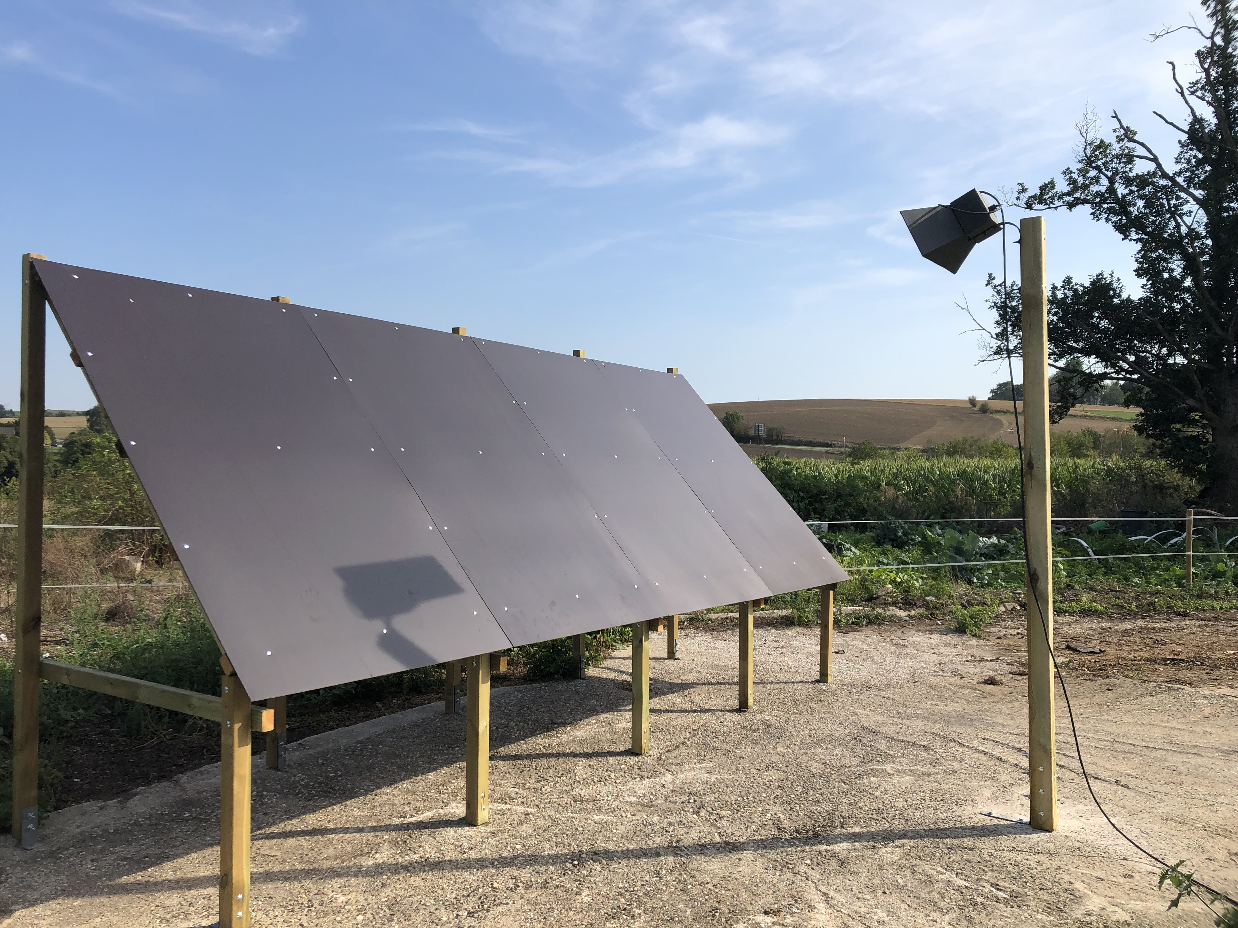 Nachbau des Einzel-Elementes einer Sheddach-Attrappe, wie sie in deutschen Nachtscheinanlage verwendet wurde. Originalgetreue Rekonstruktion der "Einseitigen S-Leuchtwand" nach Vorlage des "Täuschungsgerätes Nr. 3" aus den "Bau- und Betriebsgrundsätzen für Scheinanlagen", mit der dazugehörigen "S-Richtleuchte" zur indirekten Ausleuchtung. Die Attrappe ist seit August 2019 im Außengelände der Krupp'schen Nachscheinanlage Velbert aufgestellt.